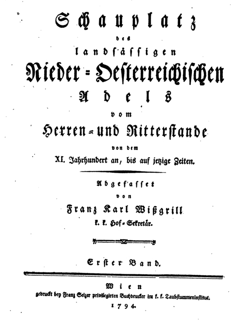 Titelblatt des Werks „Schauplatz des landsässigen Nieder-Österreichischen Adels vom Herren- und Ritterstande von dem XI. Jahrhundert an, bis auf jetzige Zeiten“